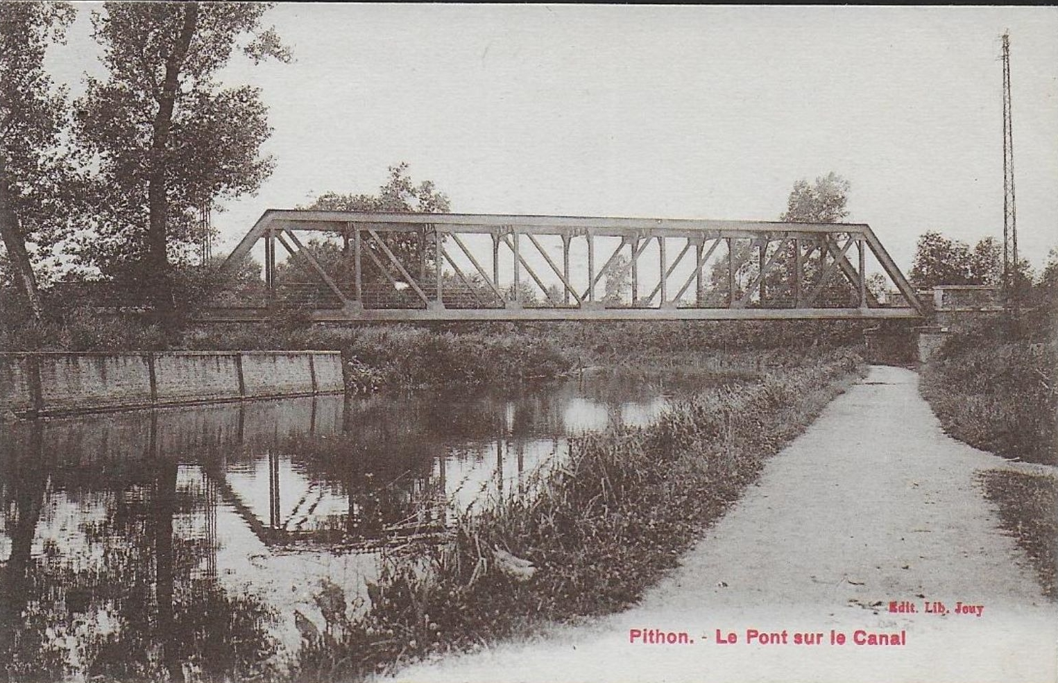 Le pont de la ligne de Saint-Quentin à Ham au-dessus du canal de la Somme à Pithon